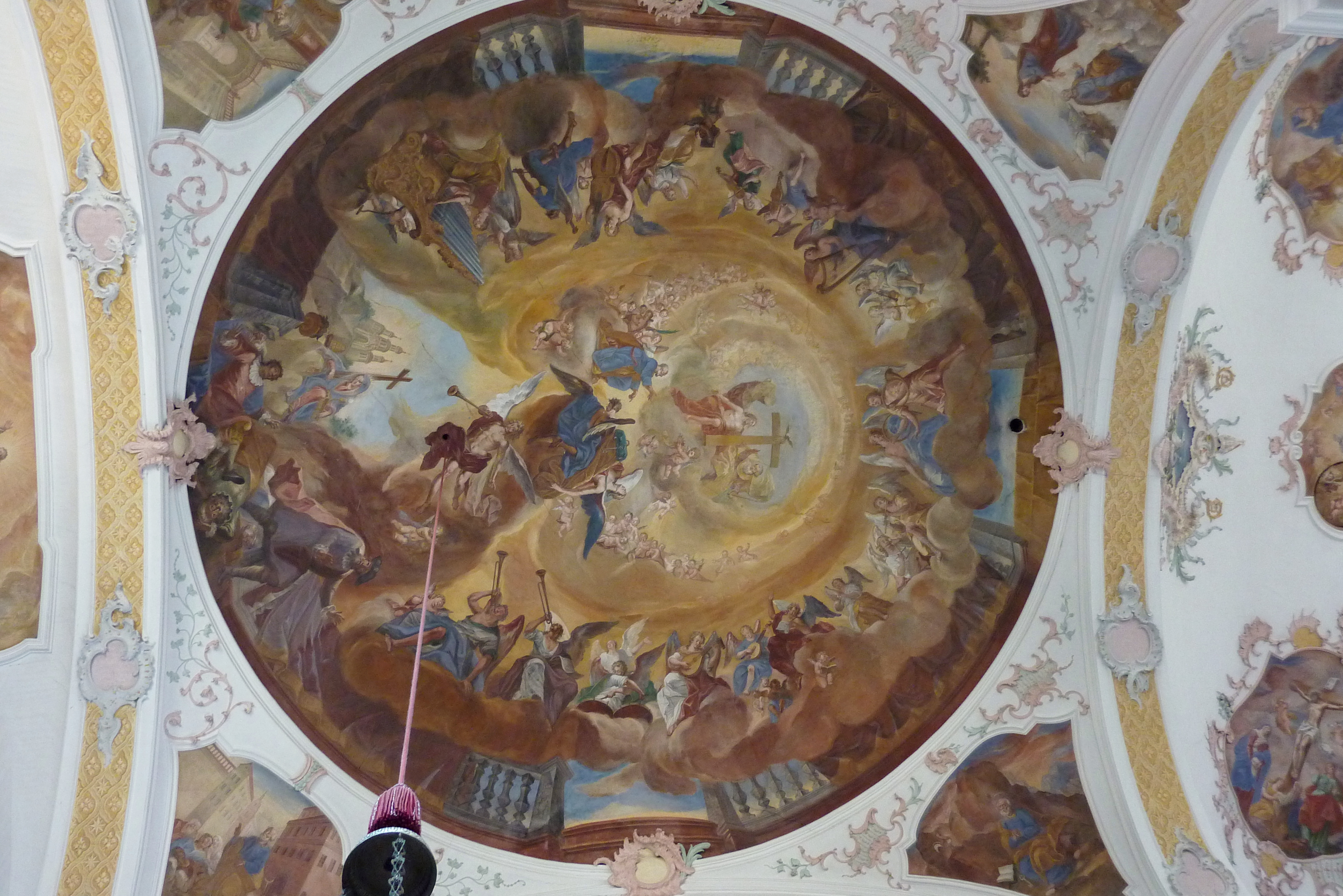 Katholische Pfarrkirche St. Peter in Tapfheim im Landkreis Donau-Ries (Bayern), Deckenfresko um 1750, von Anton Enderle (1700-1761), Darstellung: Dreifaltigkeit